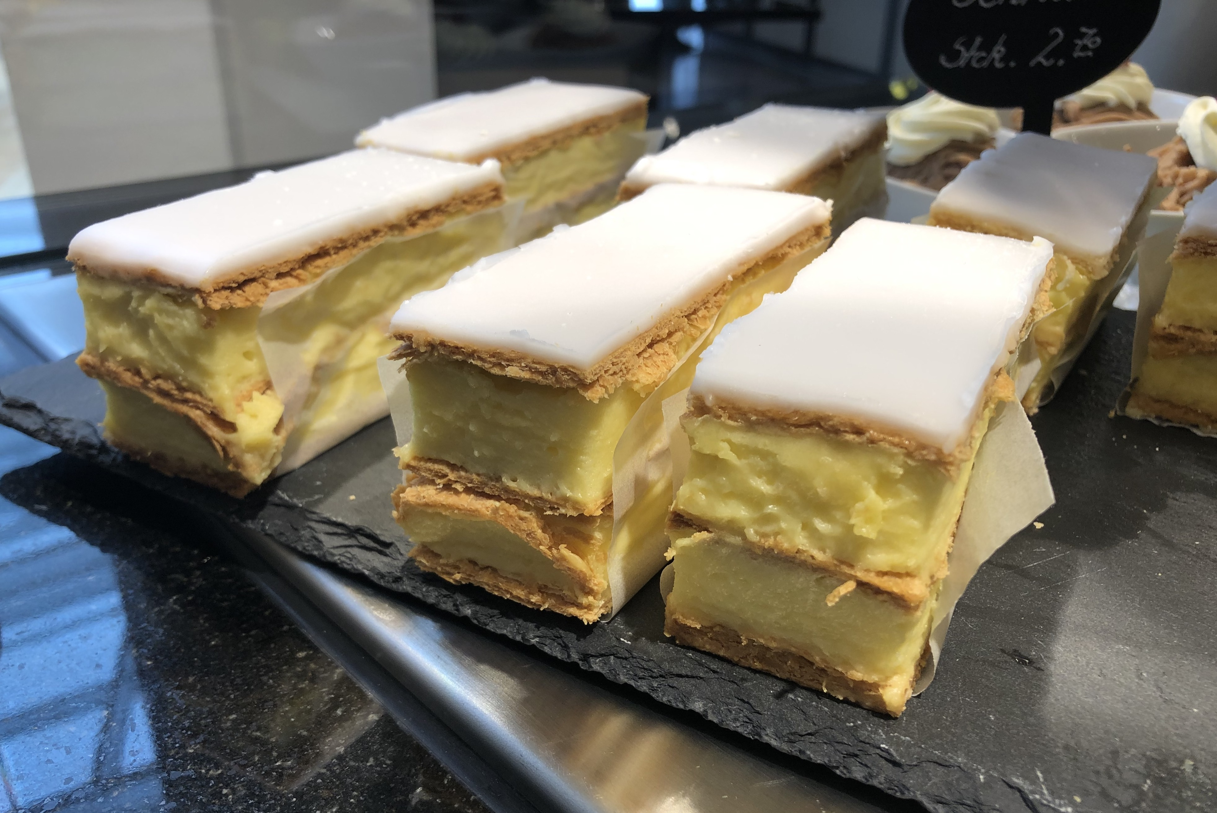 Cremeschnitte